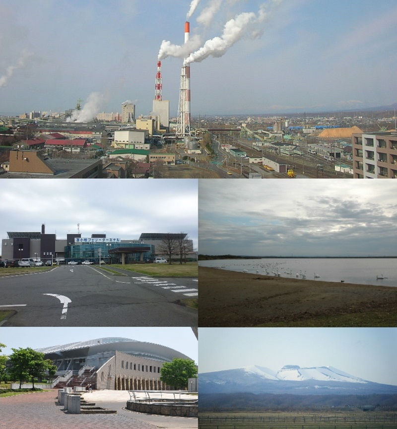 北海道苫小牧市のモンタージュ画像